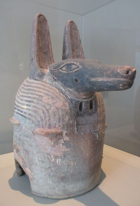 Anubis- Maske für einen Totenpriester